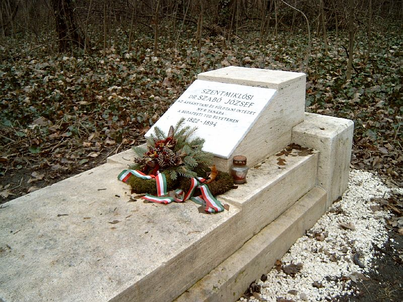 Szabó József (Kalocsa, 1822. márc. 14. – Bp., 1894. ápr. 10.): bányamérnök, geológus, mineralógus, egyetemi tanár sírja Budapesten. Kerepesi temető: 48/1-3-35 [szobrász: Szécsi Antal].